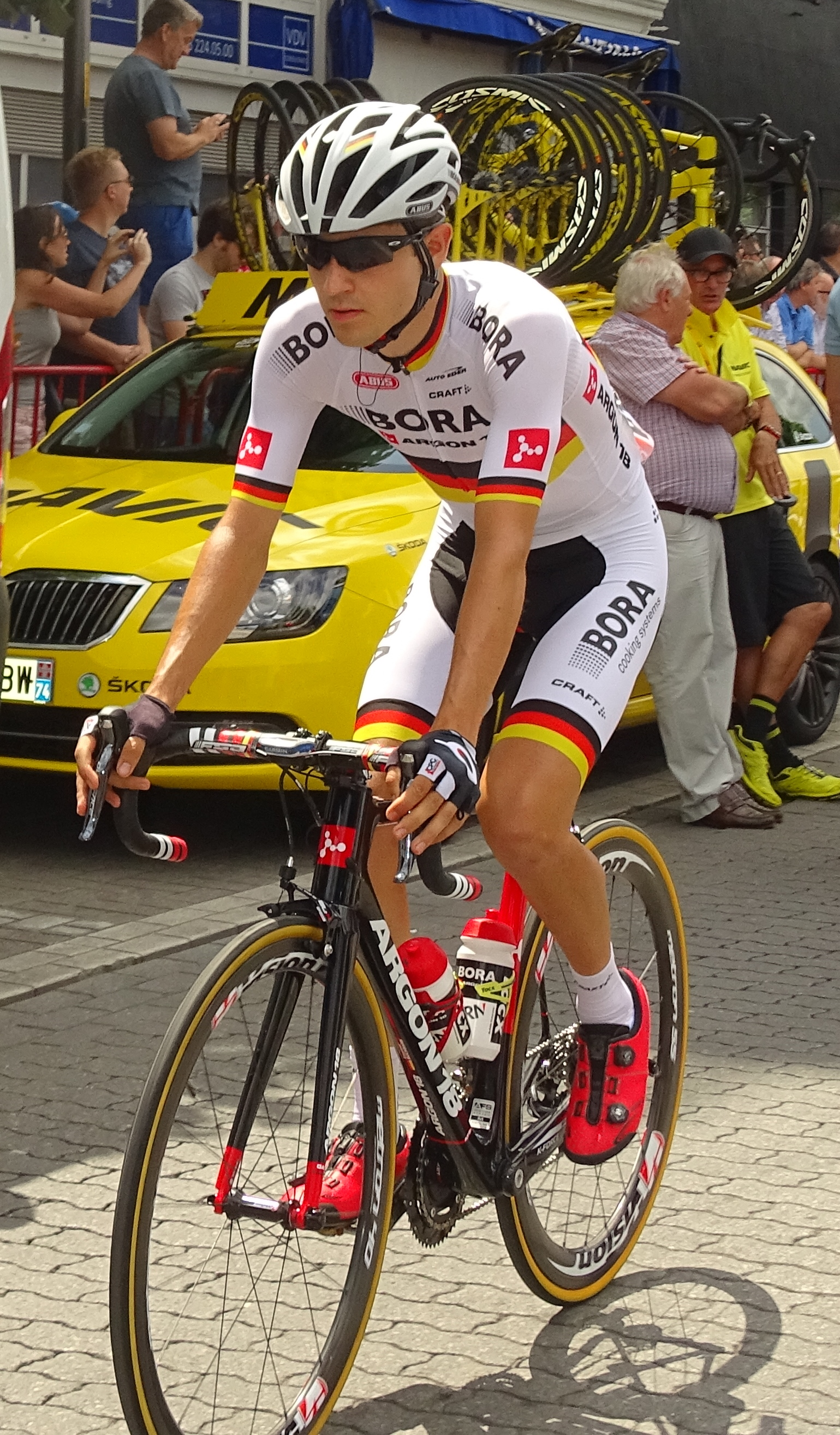 Reportage réalisé le lundi 6 juillet à l'occasion du départ de la troisième étape du Tour de France 2015 à Anvers, Belgique.